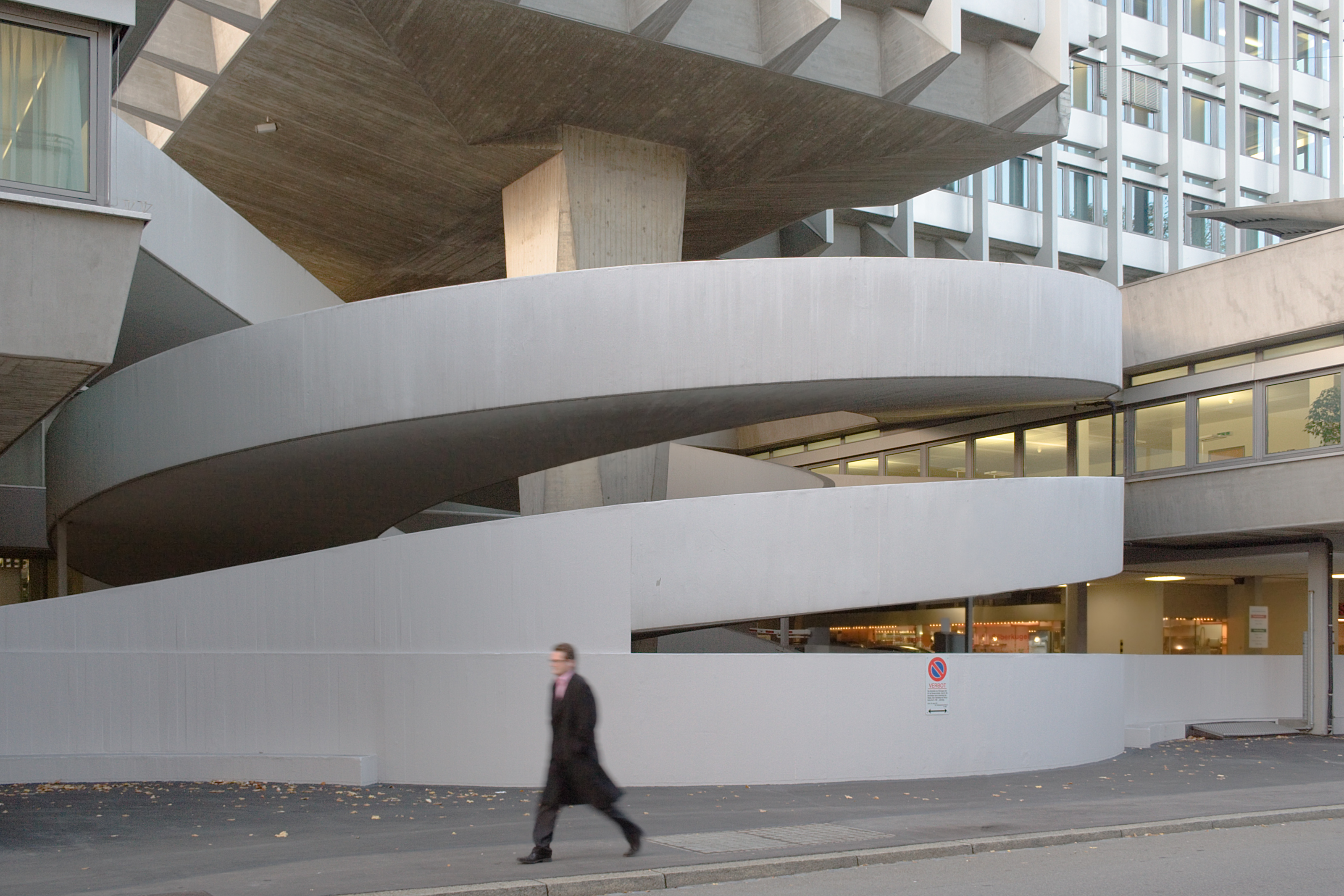 Freitragende Auffahrt für Automobile auf das Dach des Hochhauses zur Palme, Bleicherweg 33, Zürich, Schweiz Die damals kühne Konstruktion musste nachträglich abgestützt werden (links im Bild), weil beim Befahren unangenehme Schwingungen auftraten.